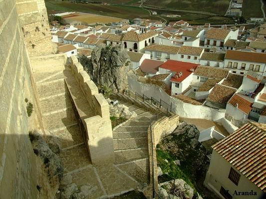 Vista parcial del pueblo desde una de las murallas.